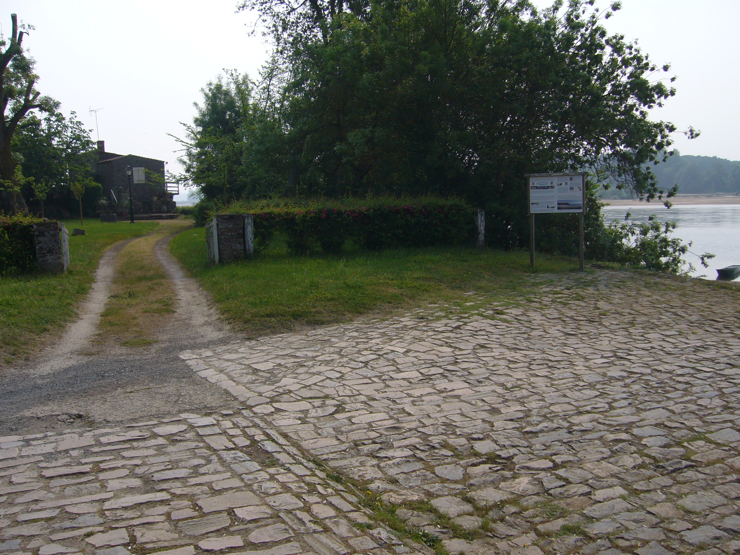 Maison de l'Emeronce, au bord de la Loire, située à Anetz au lieu-dit des Cosniers, dans laquelle vécu l'écrivain Hervé Bazin de 1959 à 1960.